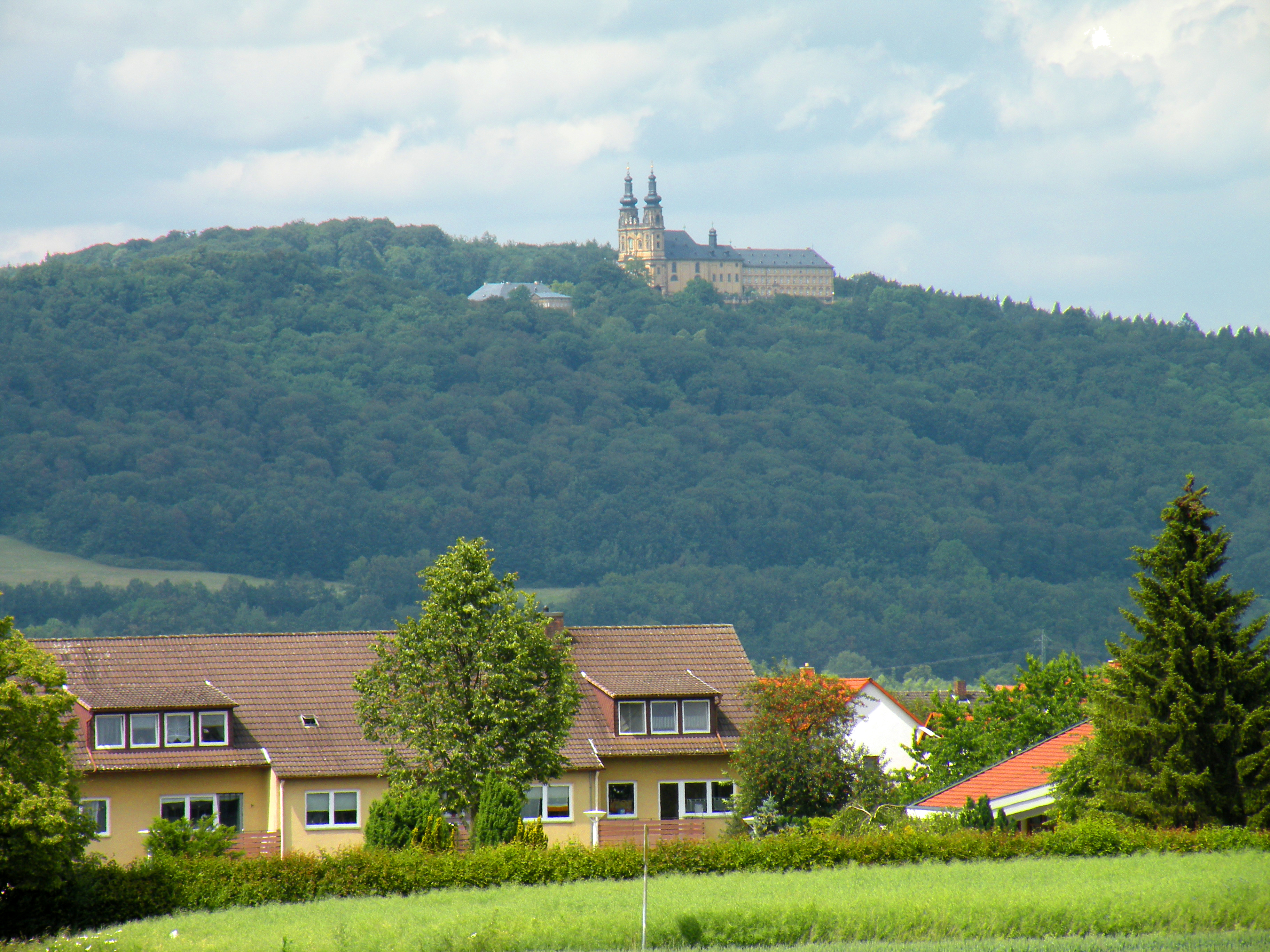 Клостер Банц